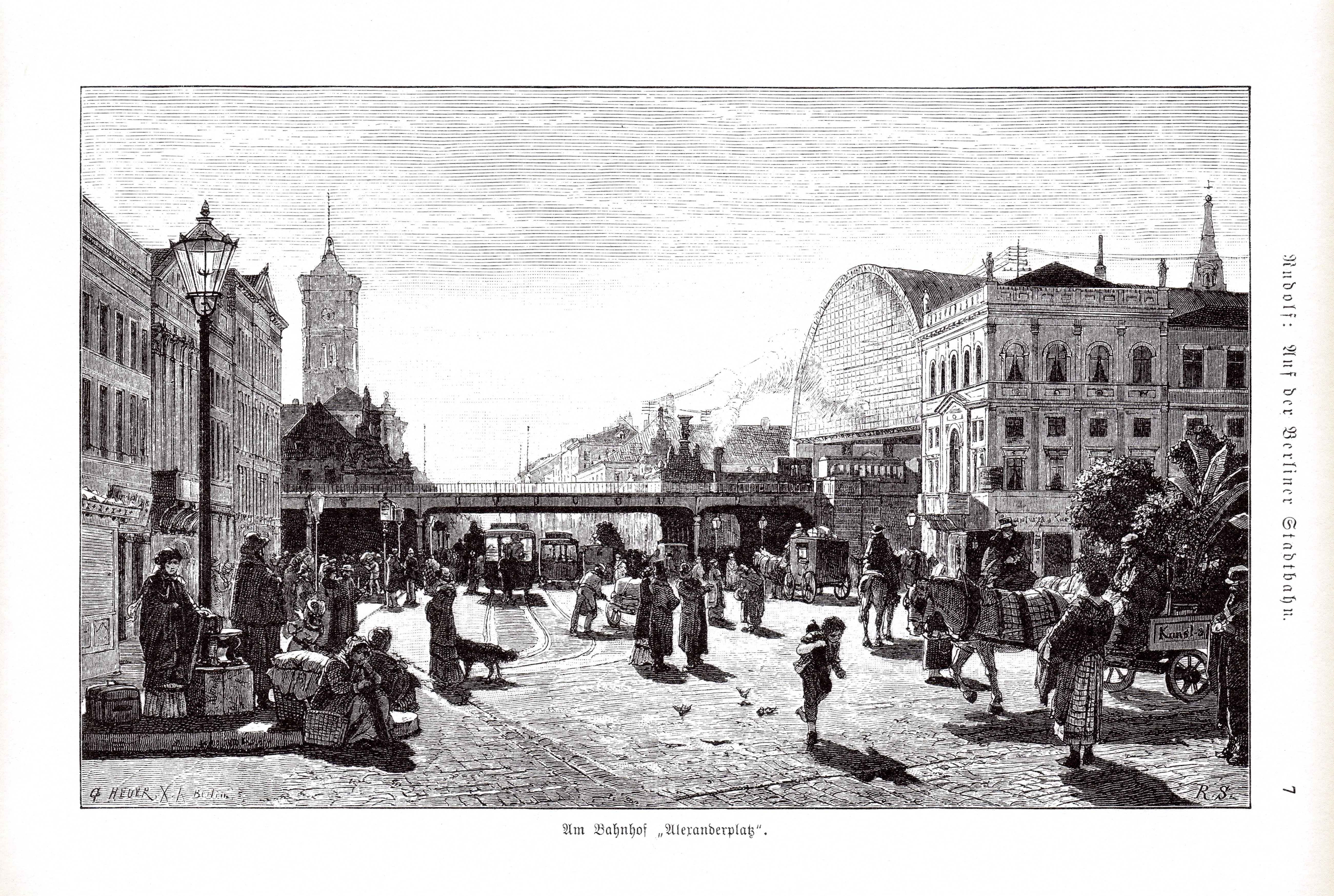 Der Holzschnitt von 1882 zeigt die neue Stadtbahn am Bahnhof Alexanderplatz.